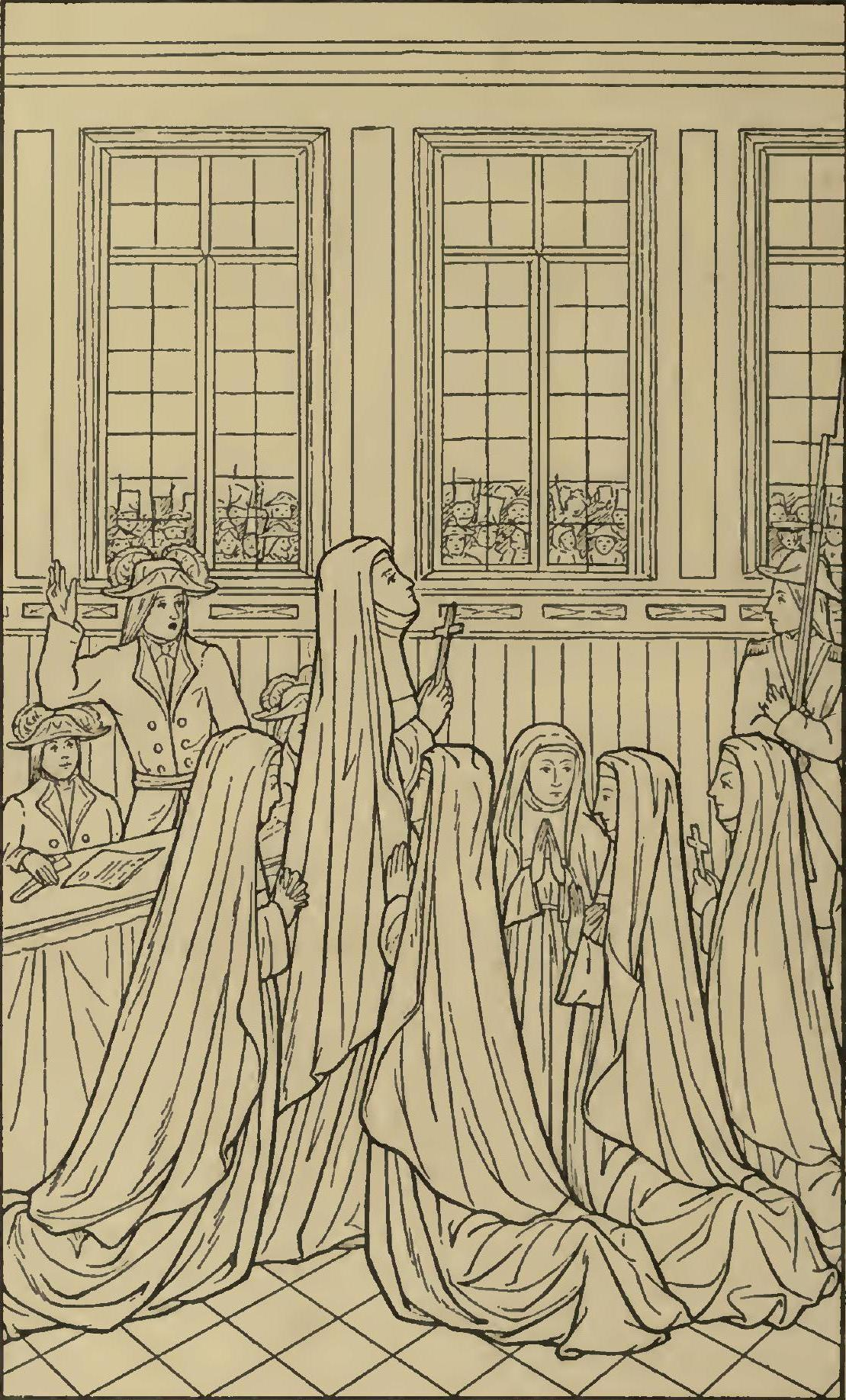 Représentation de la réaction et des prières des Ursulines de Valenciennes juste après leur condamnation à mort par guillotine (en octobre 1794).